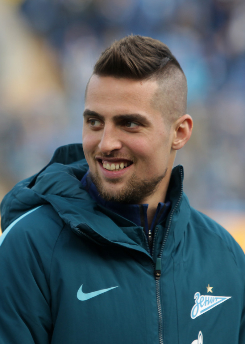 «Зенит» - «Краснодар»